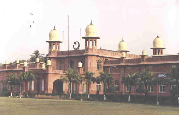 uni of agri, fsd